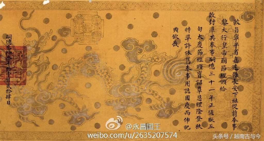 hào hùng